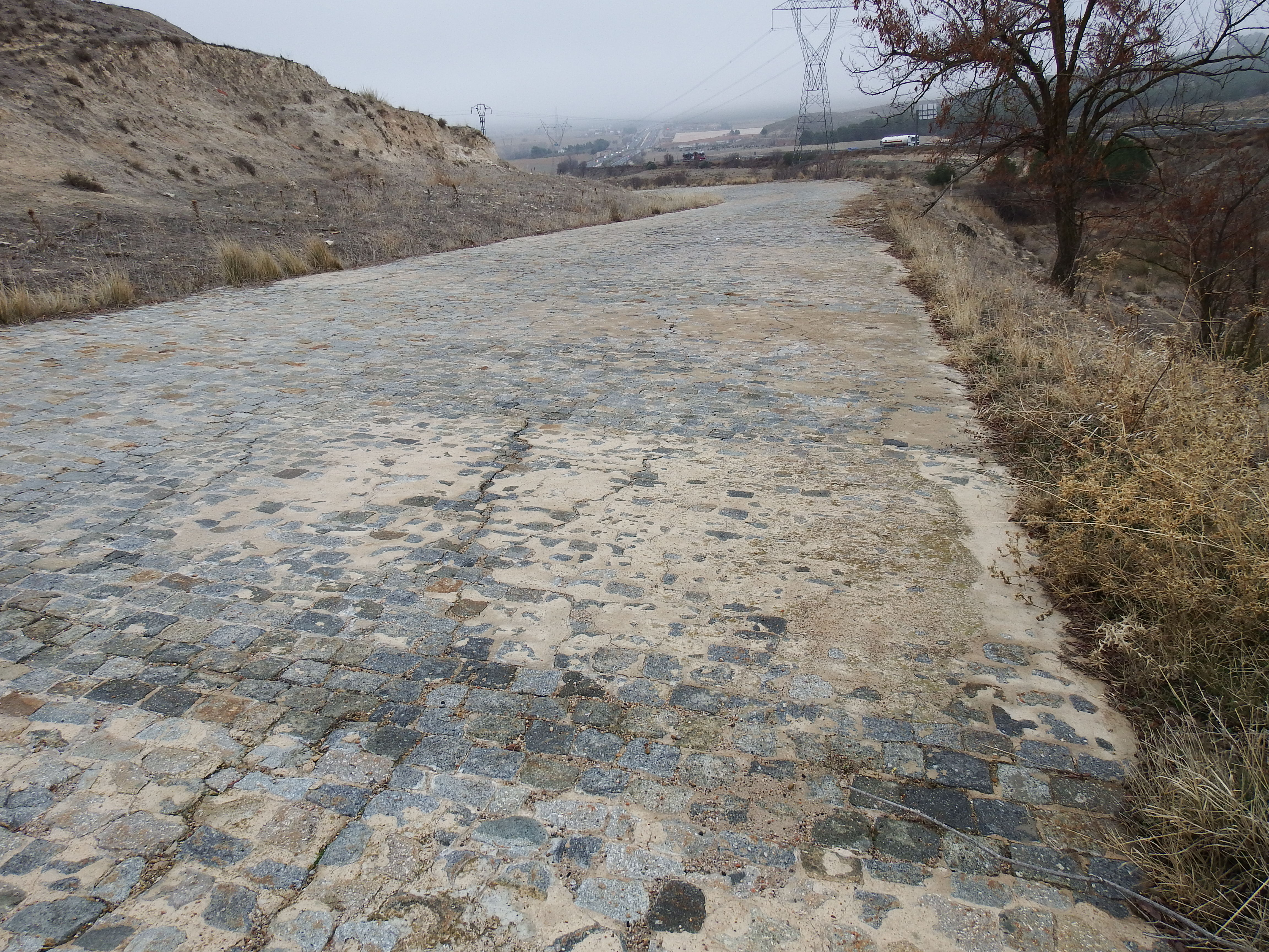 Antigua N-III